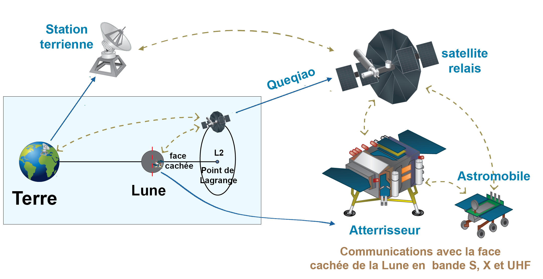 Déroulement de la mission Chang'e 4 (version originale du schéma traduite et adaptée)